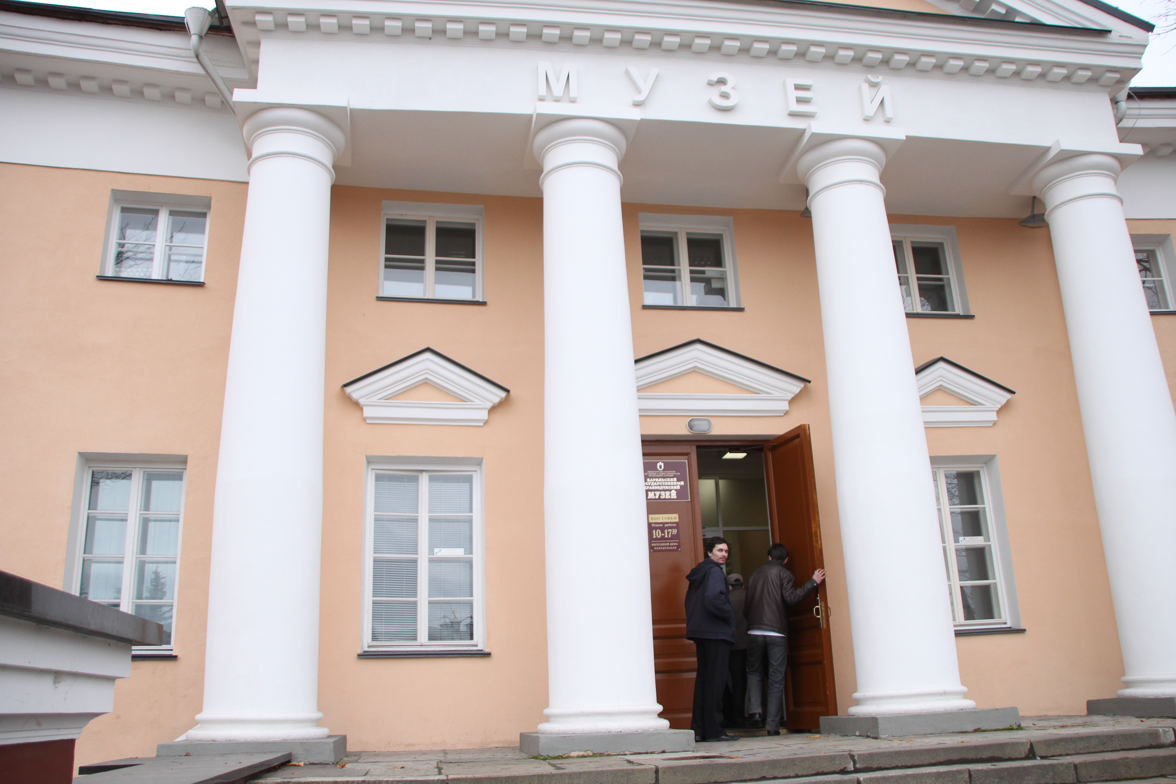 Национальный музей республики Карелия